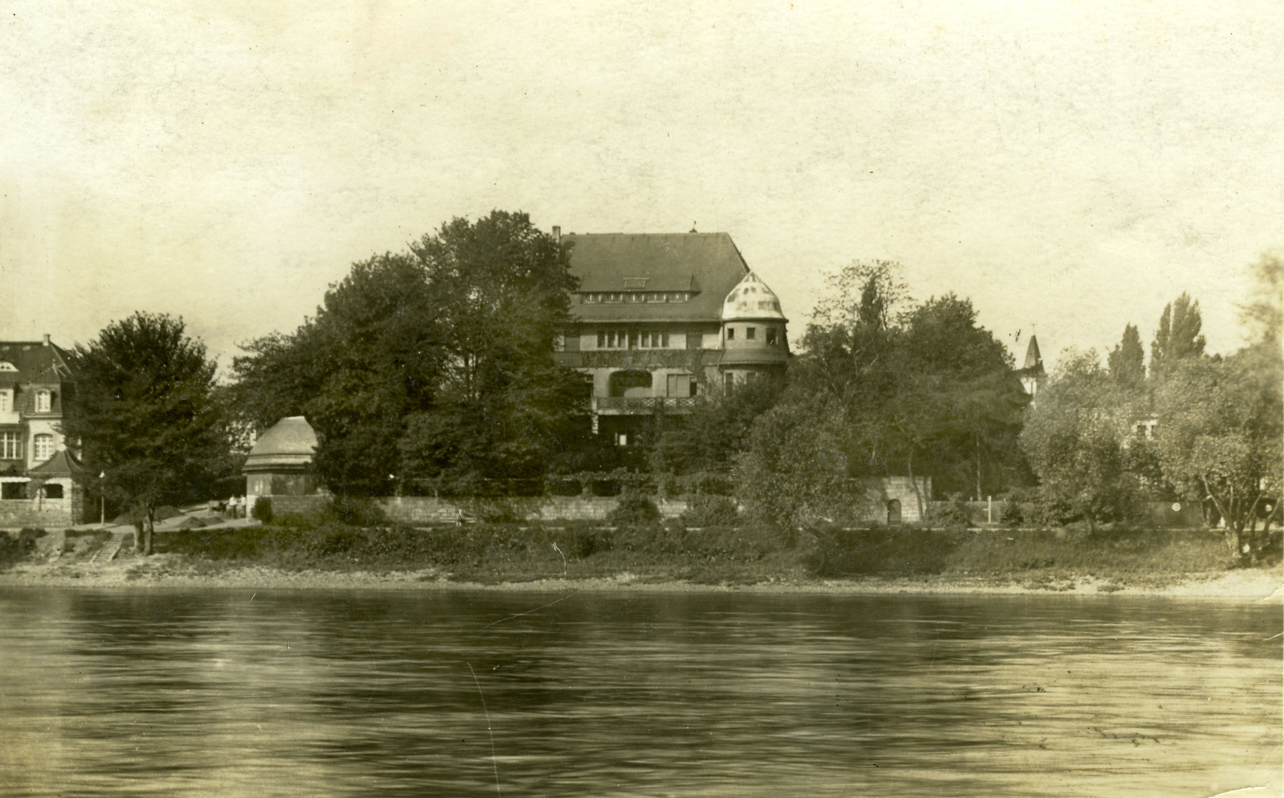 Das Dürerbundhaus in Dresden-Blasewitz, erbaut von Heinrich Tscharmann für Ferdinand Avenarius 1910/11.